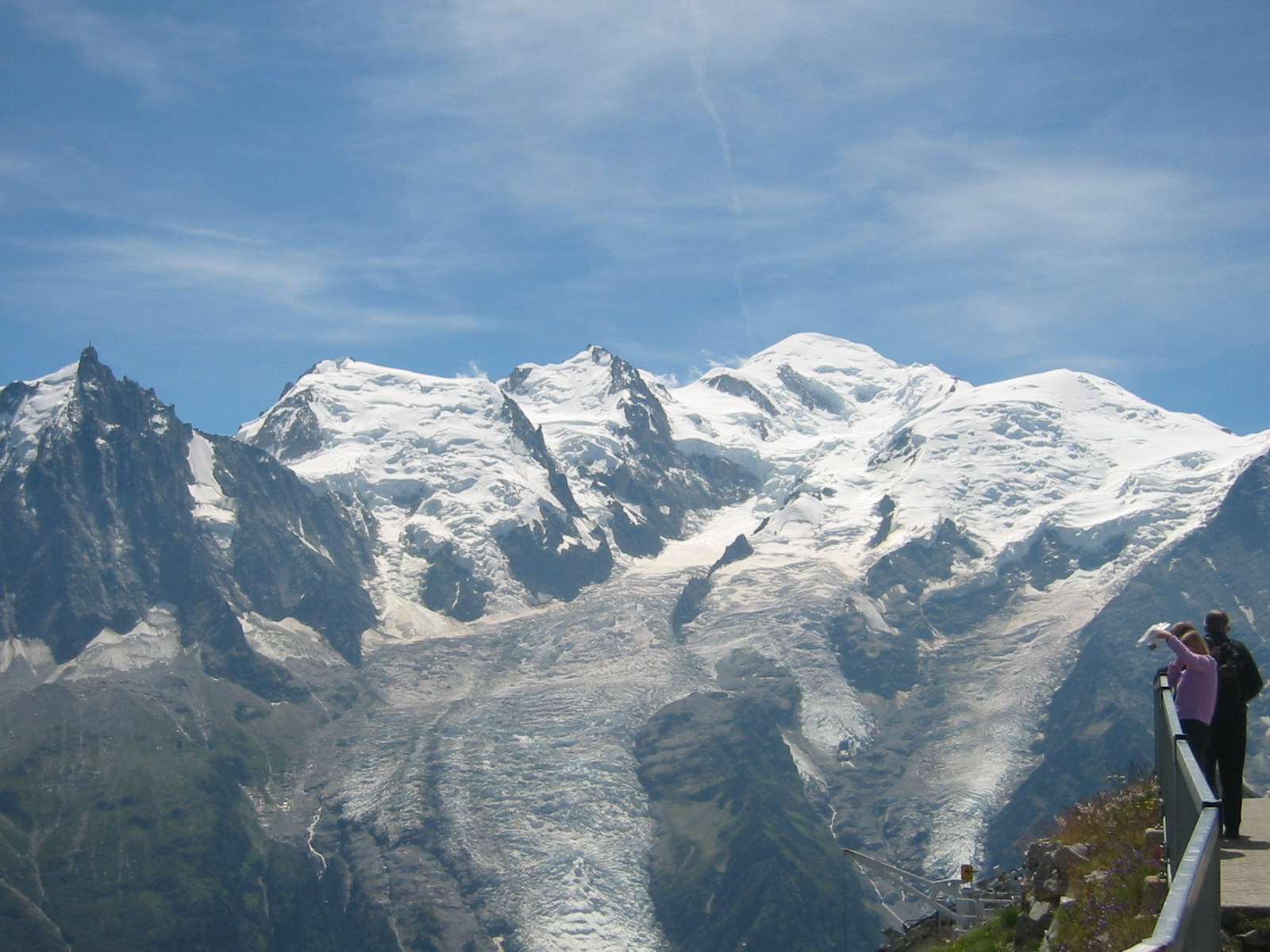 De gauche à droite, l'aiguille du Midi, le Mont-Blanc du Tacul, le Mont Maudit, le Mont Blanc et le dôme du Goûter depuis the sommet du Brévent.